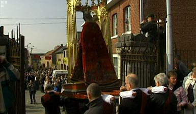 foto paardenprocessie Hakendover 2007